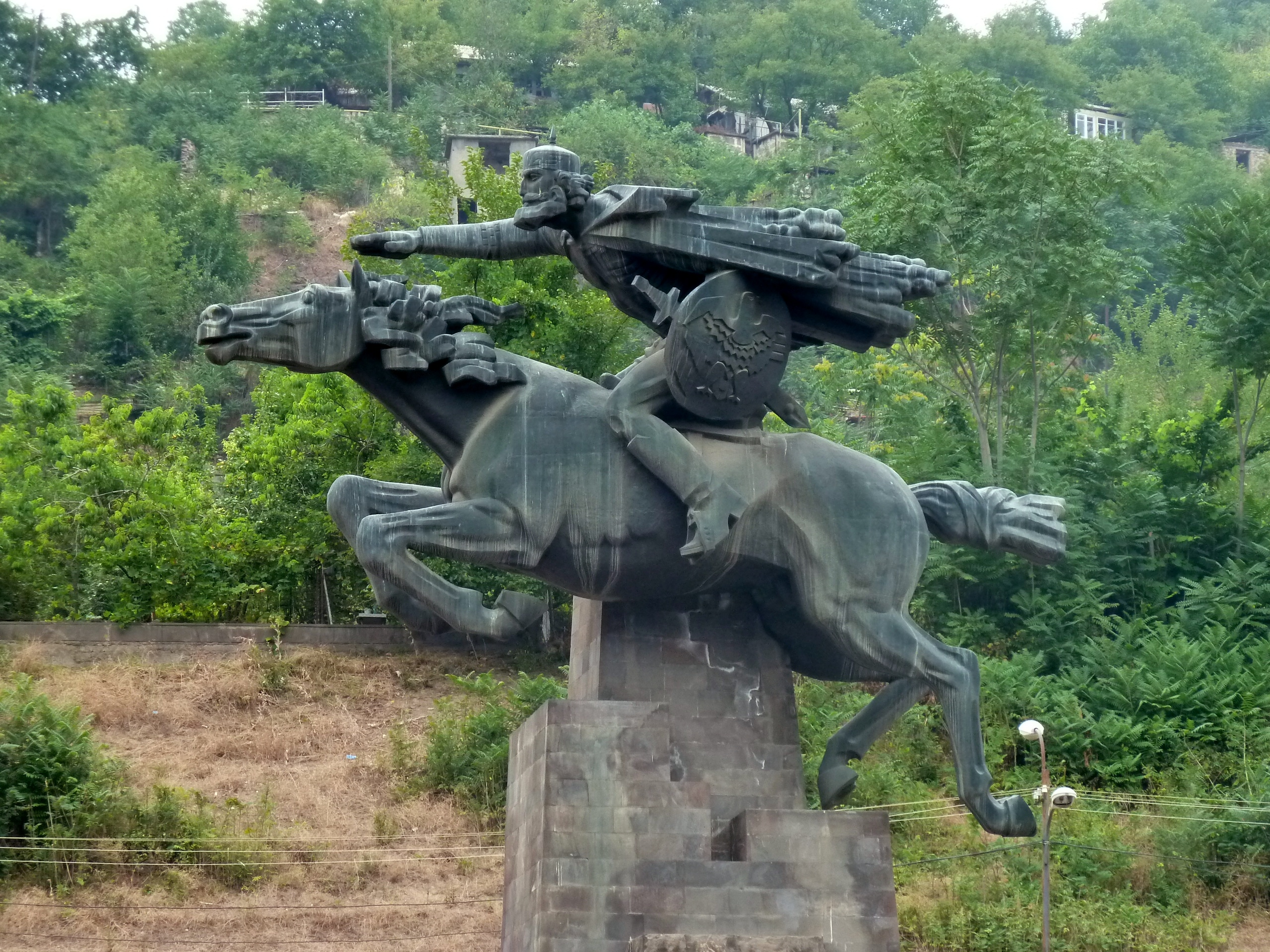 Давид-Бек